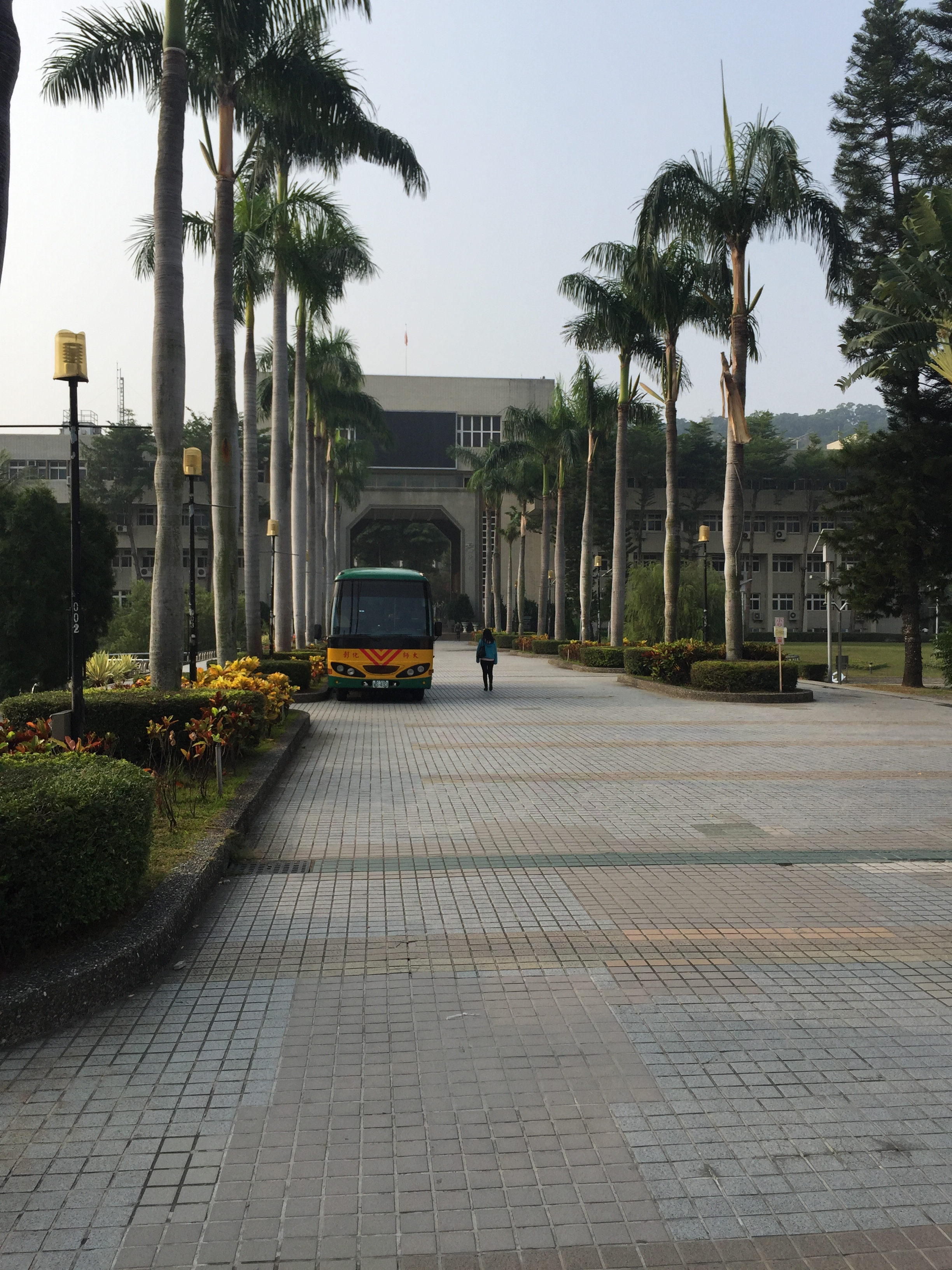 彰師大進德校區椰林大道與白沙大樓